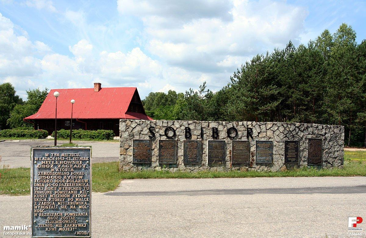 Pomnik przed wejściem na teren obozu. Budynek w tle to dawne przedszkole, wybudowane w 1975 r. zaadaptowane na muzeum w 1993 r.